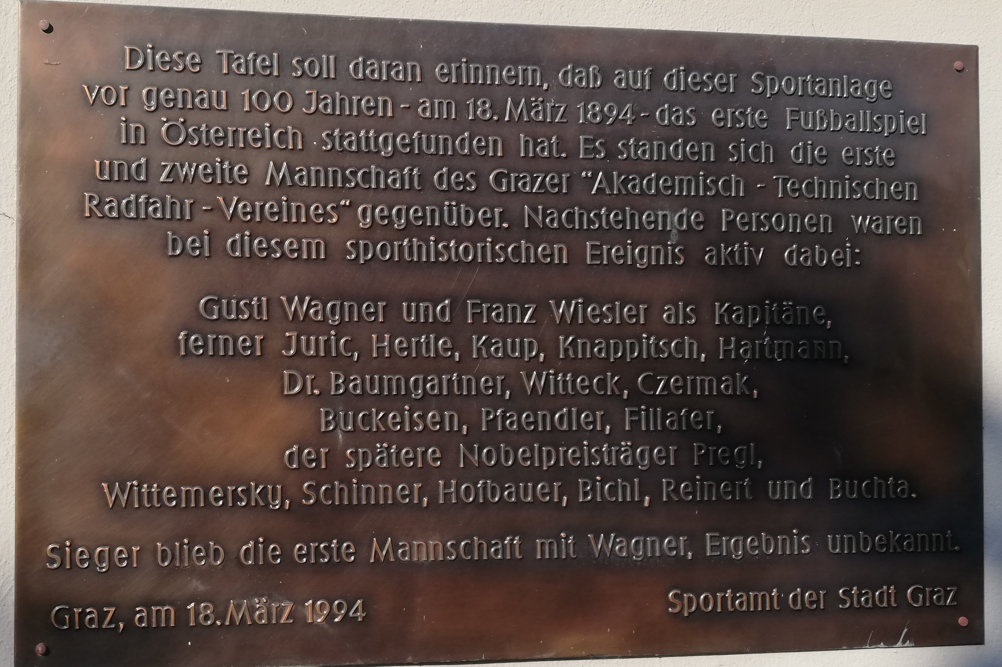 Fritz Pregl, participant of the first Austrian football match, Graz 1894-03-18 (commemorative plaque Graz, Jahngasse 3)